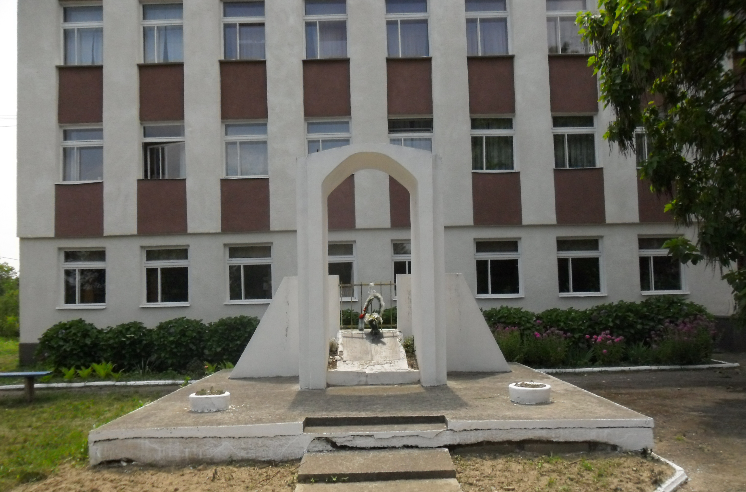 A sztálini lágerekbe elhurcoltak emlékműve (Tiszaújlak, Kárpátalja, Ukrajna)